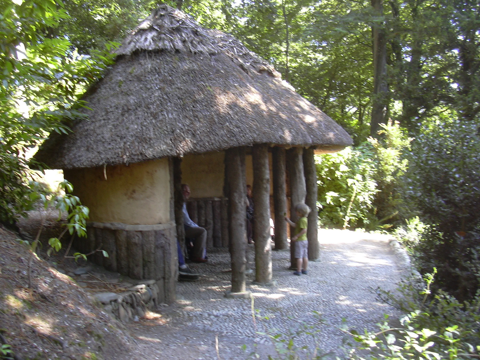 Trebah Garden - Alice's Seat